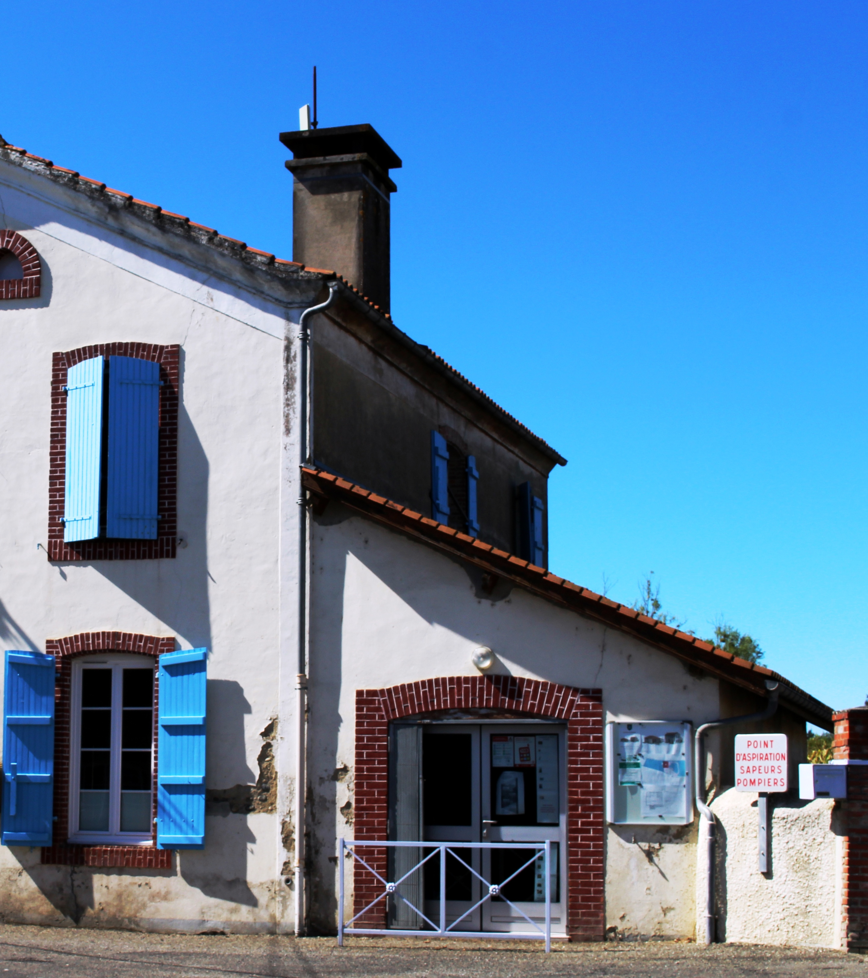 Salle des fêtes de Gensac (Hautes-Pyrénées)